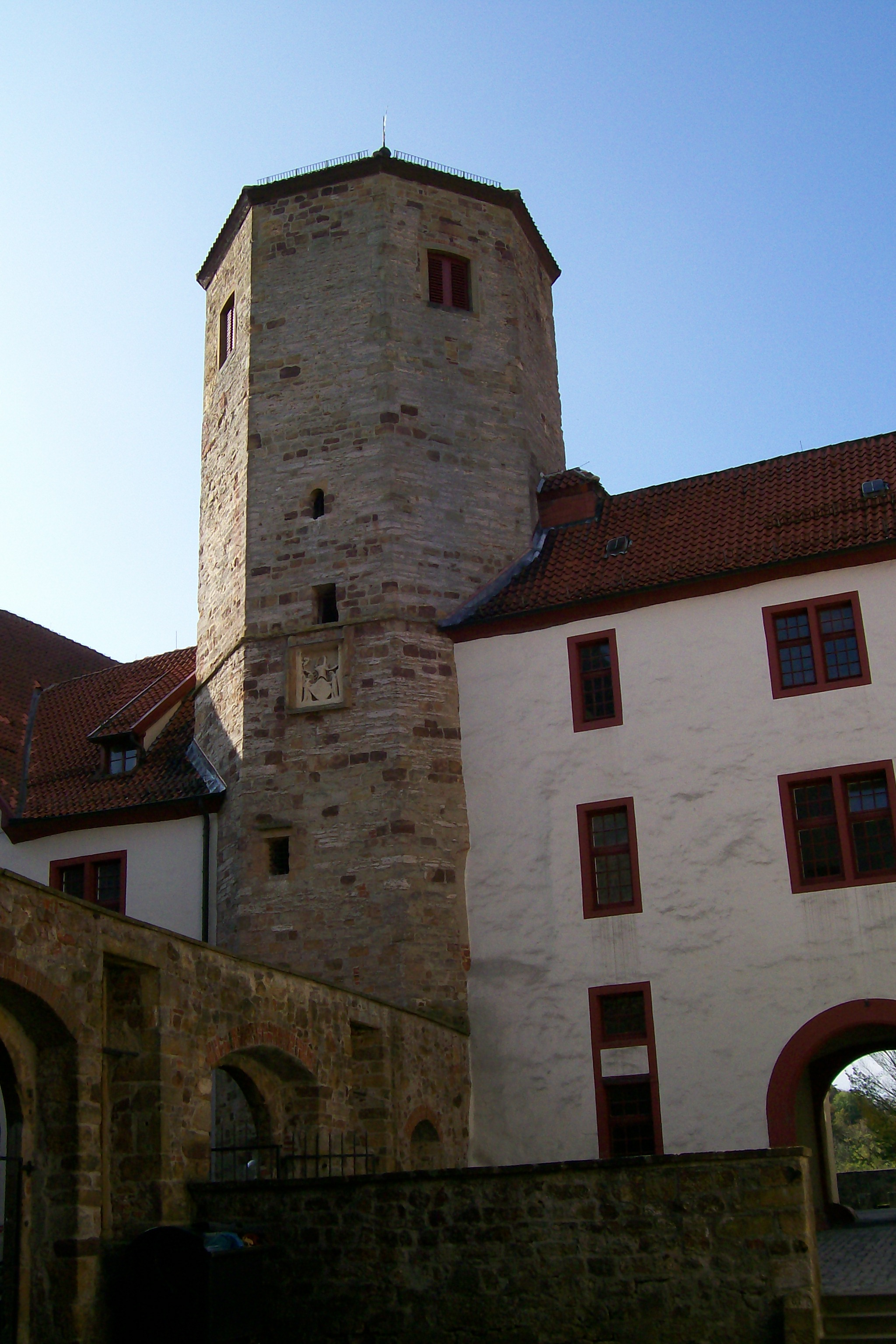 Schloss und Benediktinerabtei Iburg, Bennoturm (Bergfried)